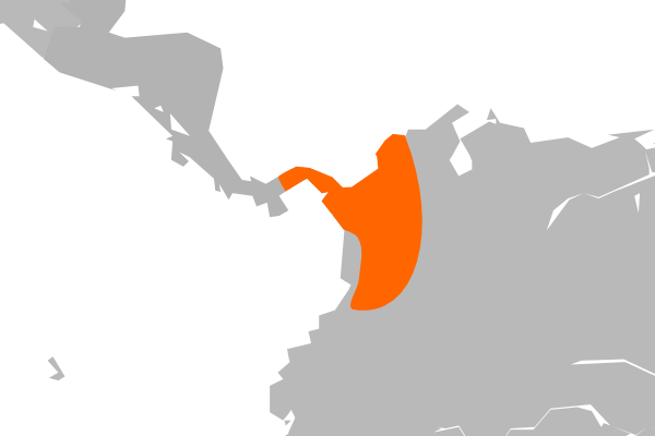 レウエンベルゲリア・ブレオの分布図 File:Central America (orthographic projection).svgを改変